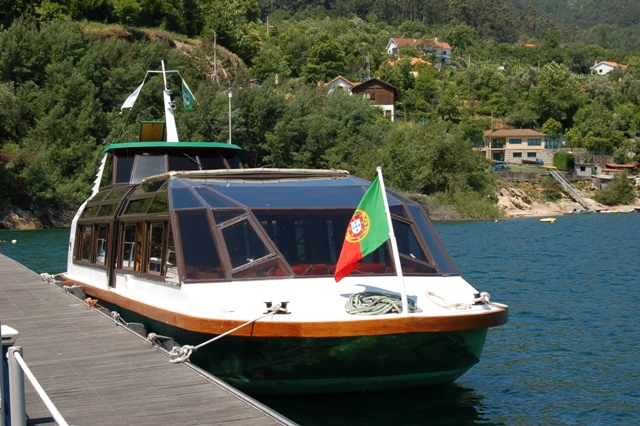 Embarcação Turística "Rio Caldo" (Rio Caldo, Terras de Bouro)